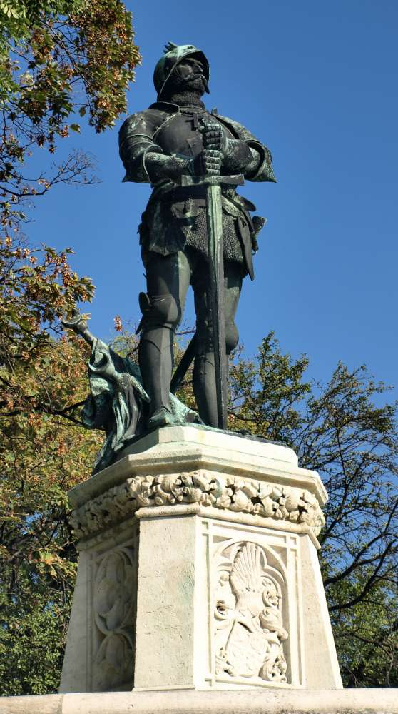 Hunyadi János szobra, Tóth István alkotása